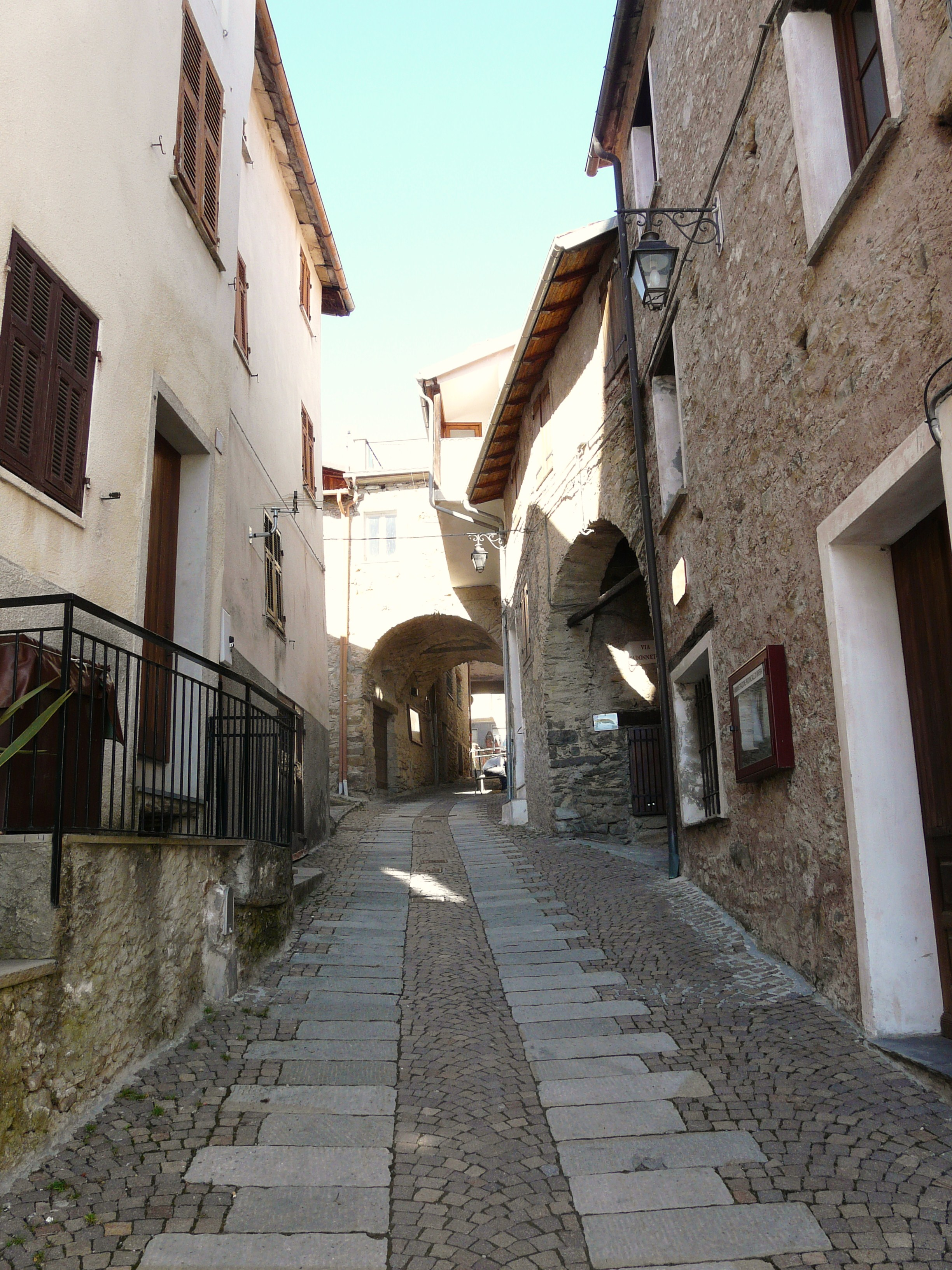 Mendatica, Liguria, Italia